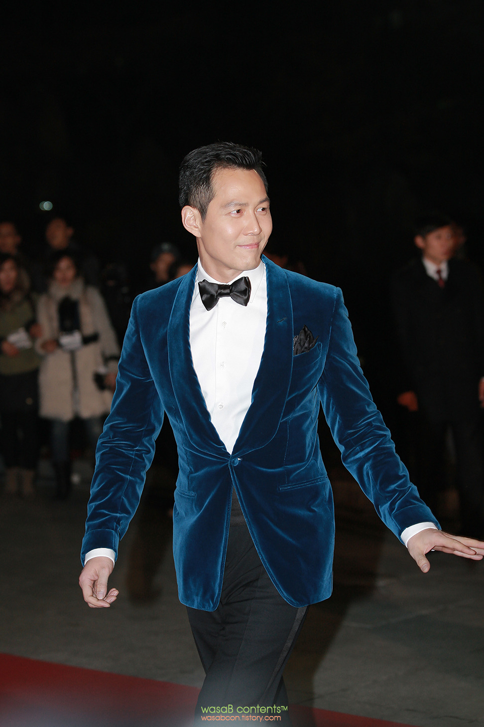 제34회 청룡영화상